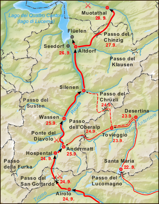 Percorso da Airolo a Muotathal dell'armata russo-austriaca sotto il comando di Alexandre Souvorov nel 1799, nell'ambito della Guerra della seconda coalizione durante la campagna in Svizzera . Datazione del calendario gregoriano.